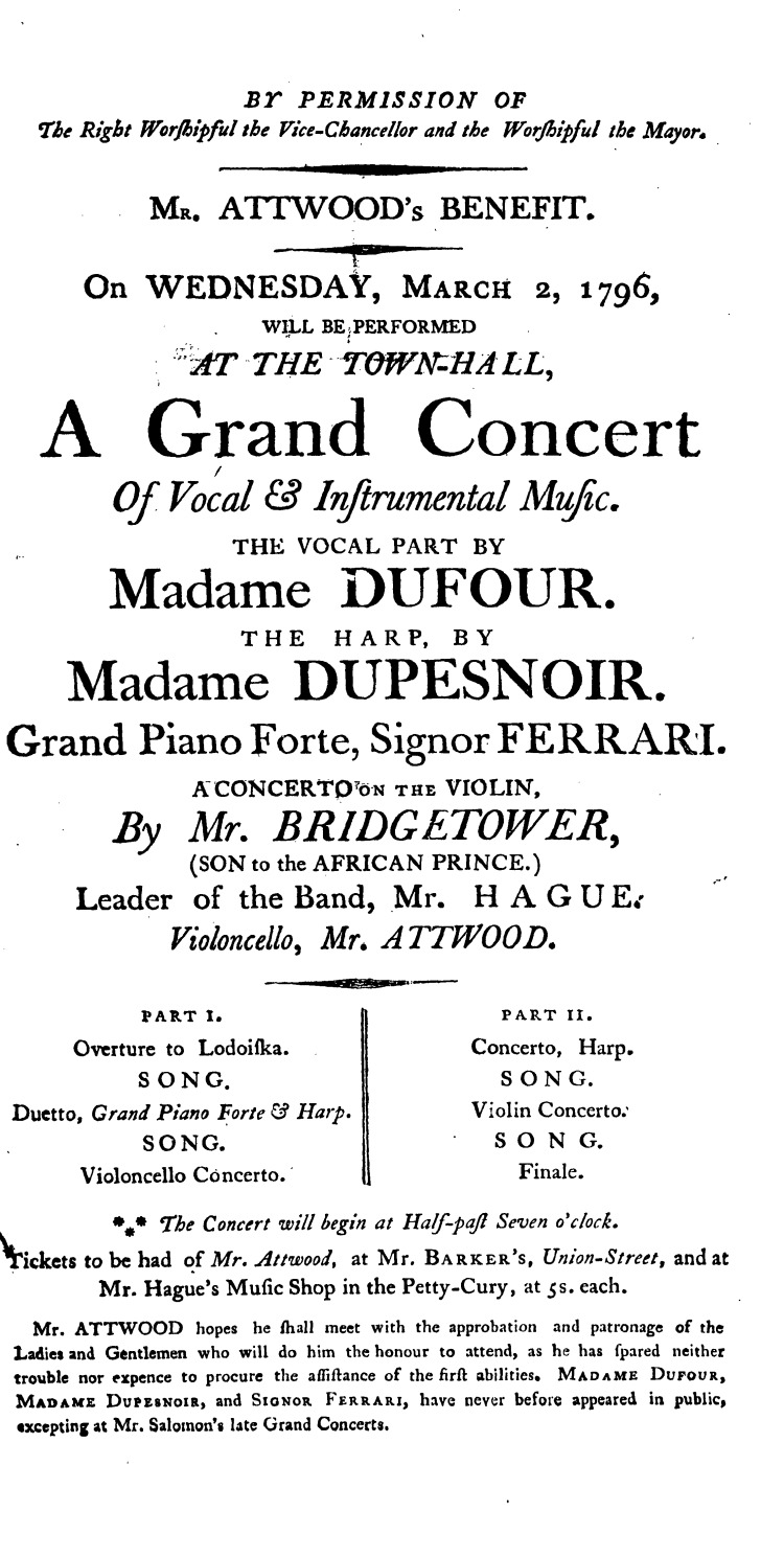 Anschlagzettel